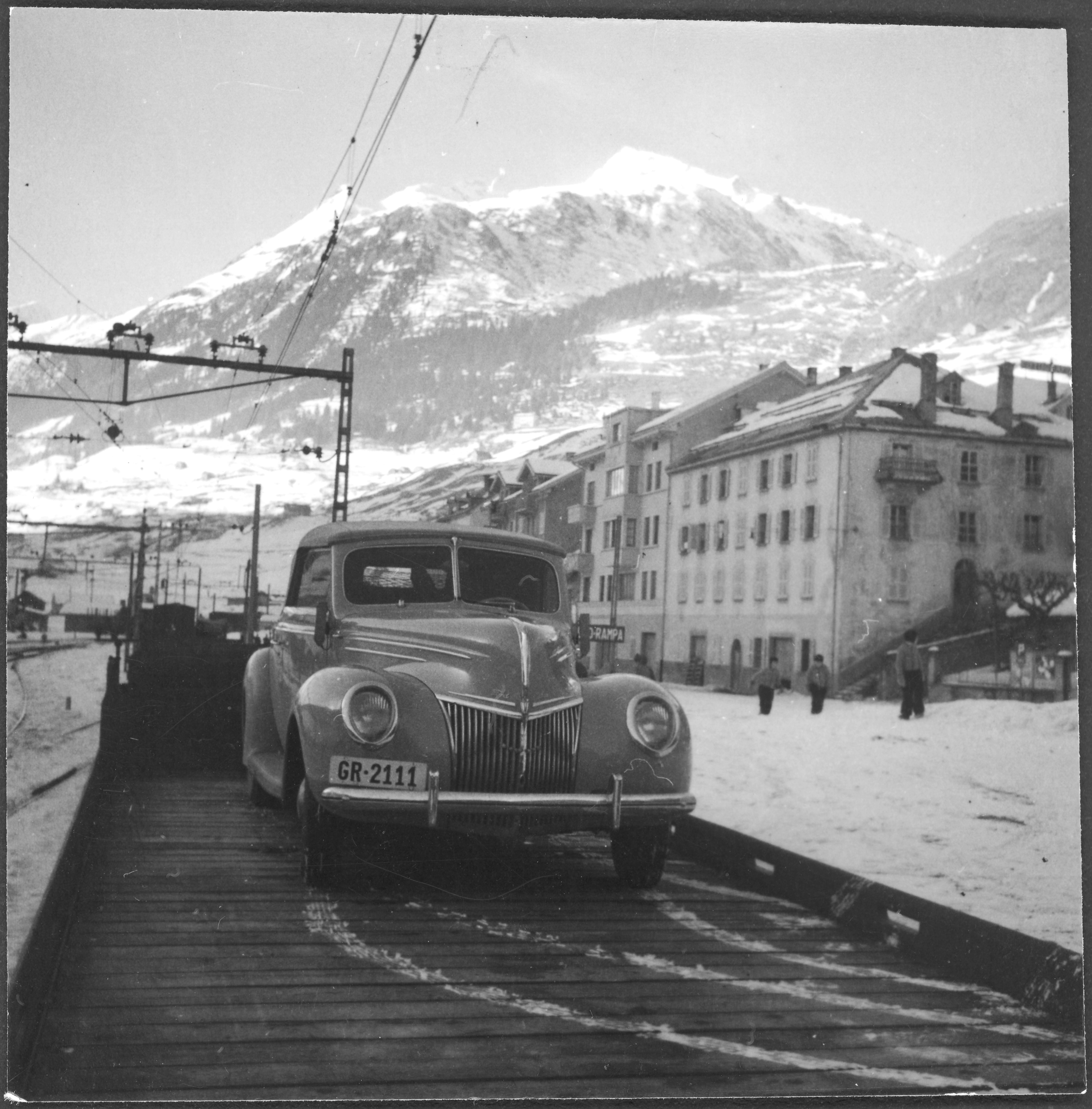 Schweiz, Airolo: Ford; Der Ford auf einem Eisenbahnwaggon, im Hintergrund Berge; Airolo